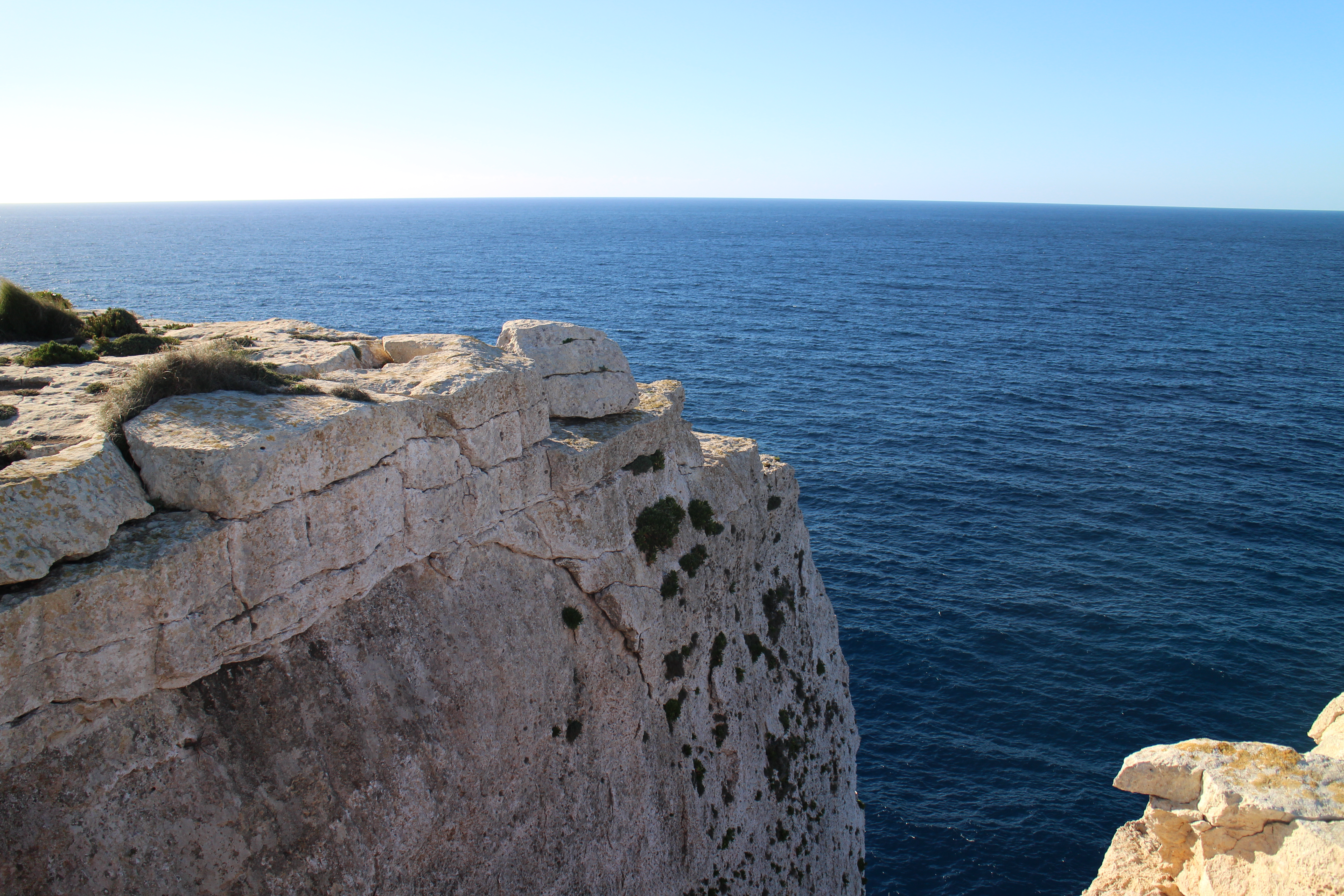 Ras ir-Raheb